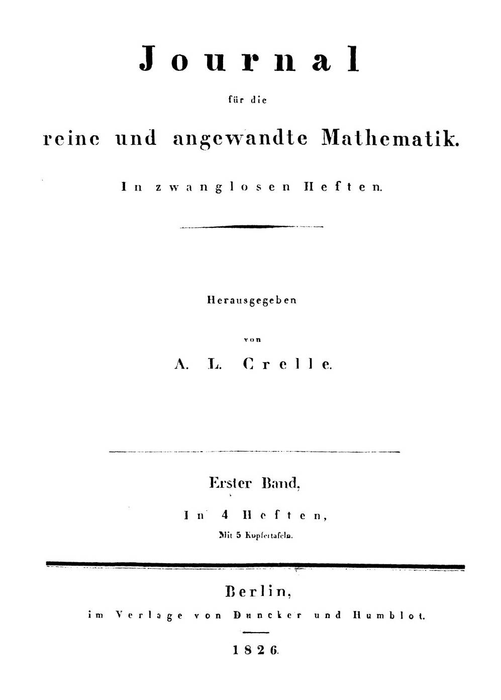 Titelseite der Zeitschrift / Title page of the periodical